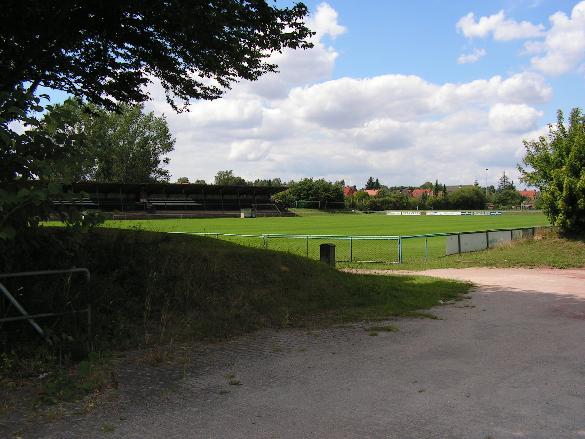 Lübeck/Sportplatz Phönix an der Travemünder Allee